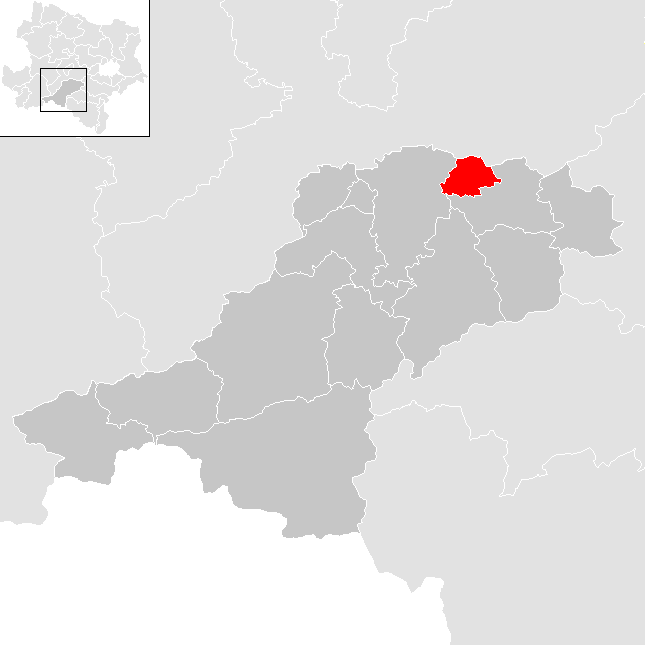 Bezirk Lilienfeld